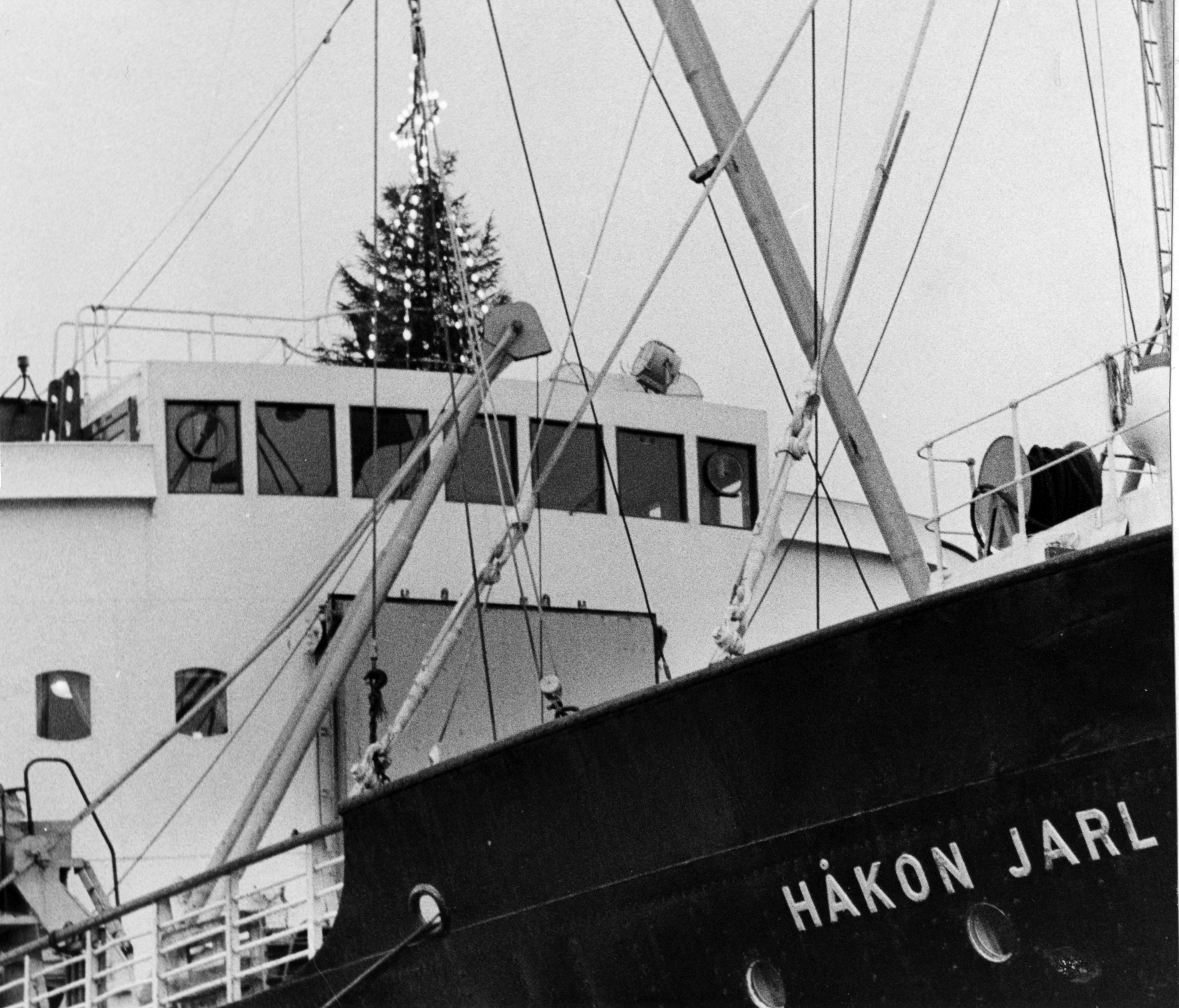 "Håkon Jarl" med juletre over broa (1964)